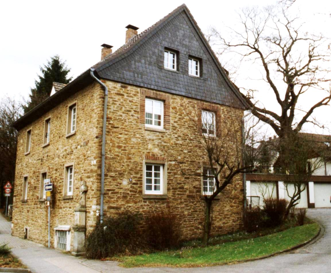 Gut auf'm Pütz aus dem Jahr 1769, Denkmalliste alt lfd.Nr. 18 neu lfd. Nr. 87; Gartenstr. 31 51429 Bergisch Gladbach